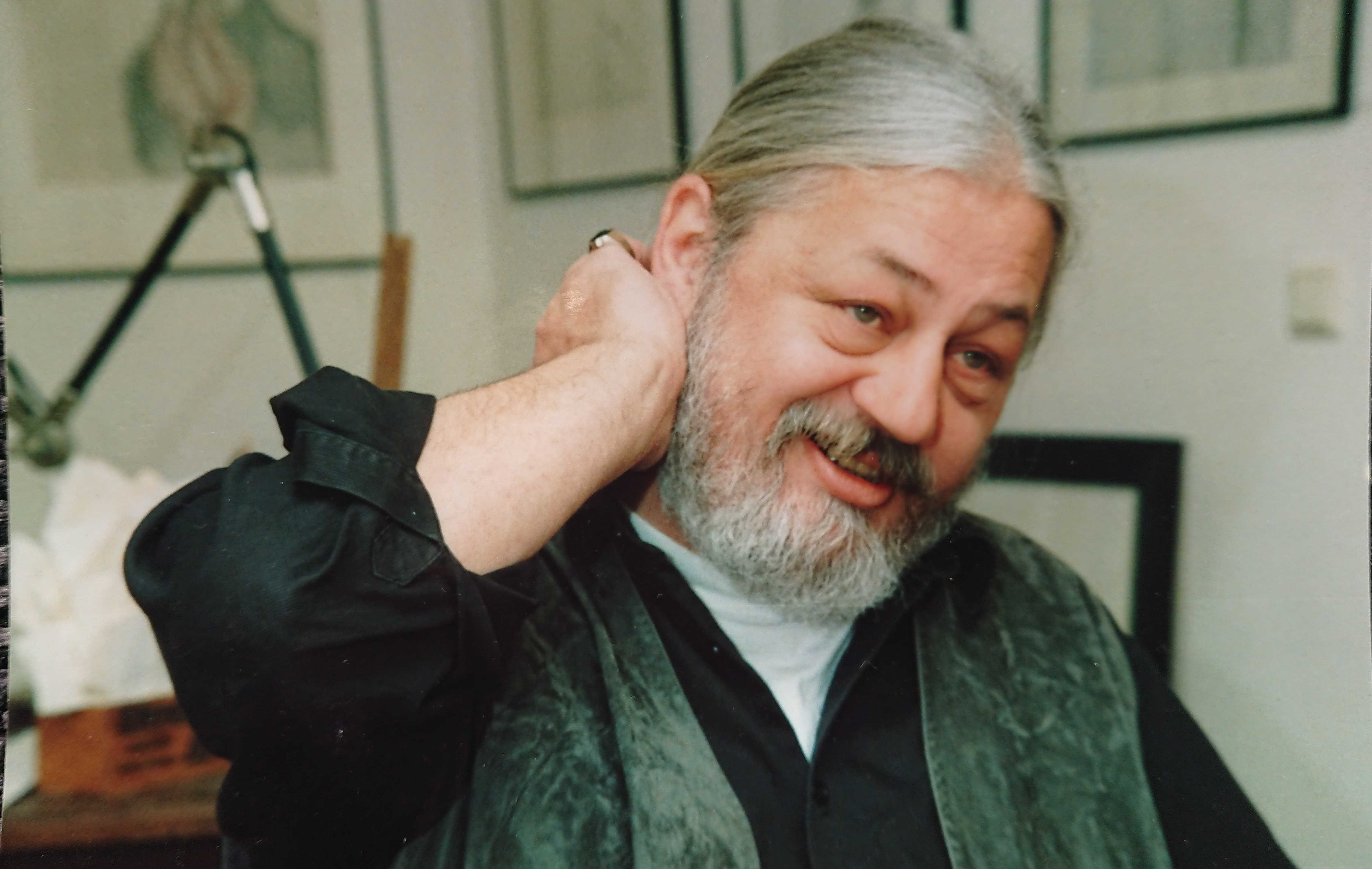 Der Grafiker Niedlich in seinem Atelier